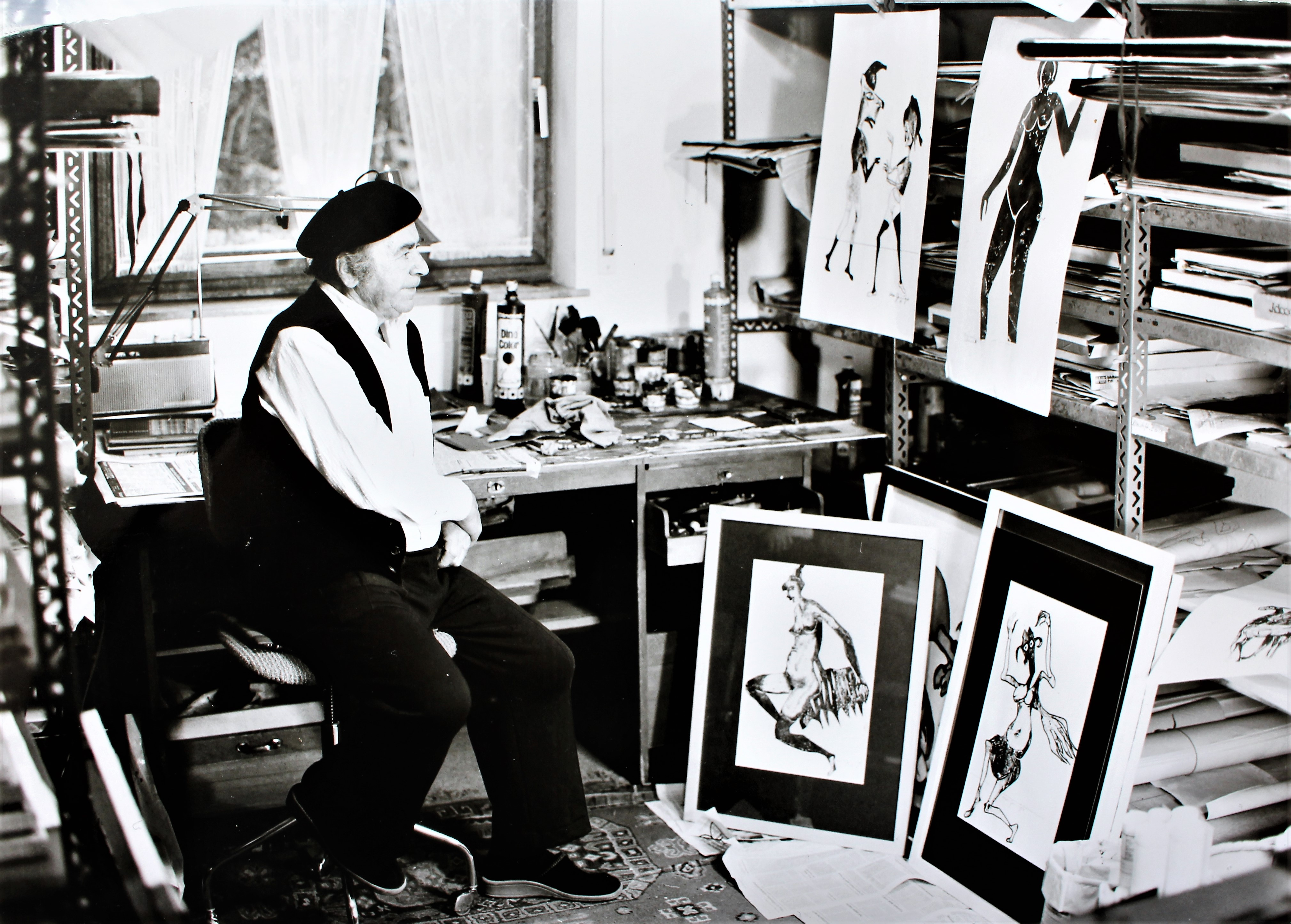 Hermann Geiger in seinem Stuttgarter Atelier